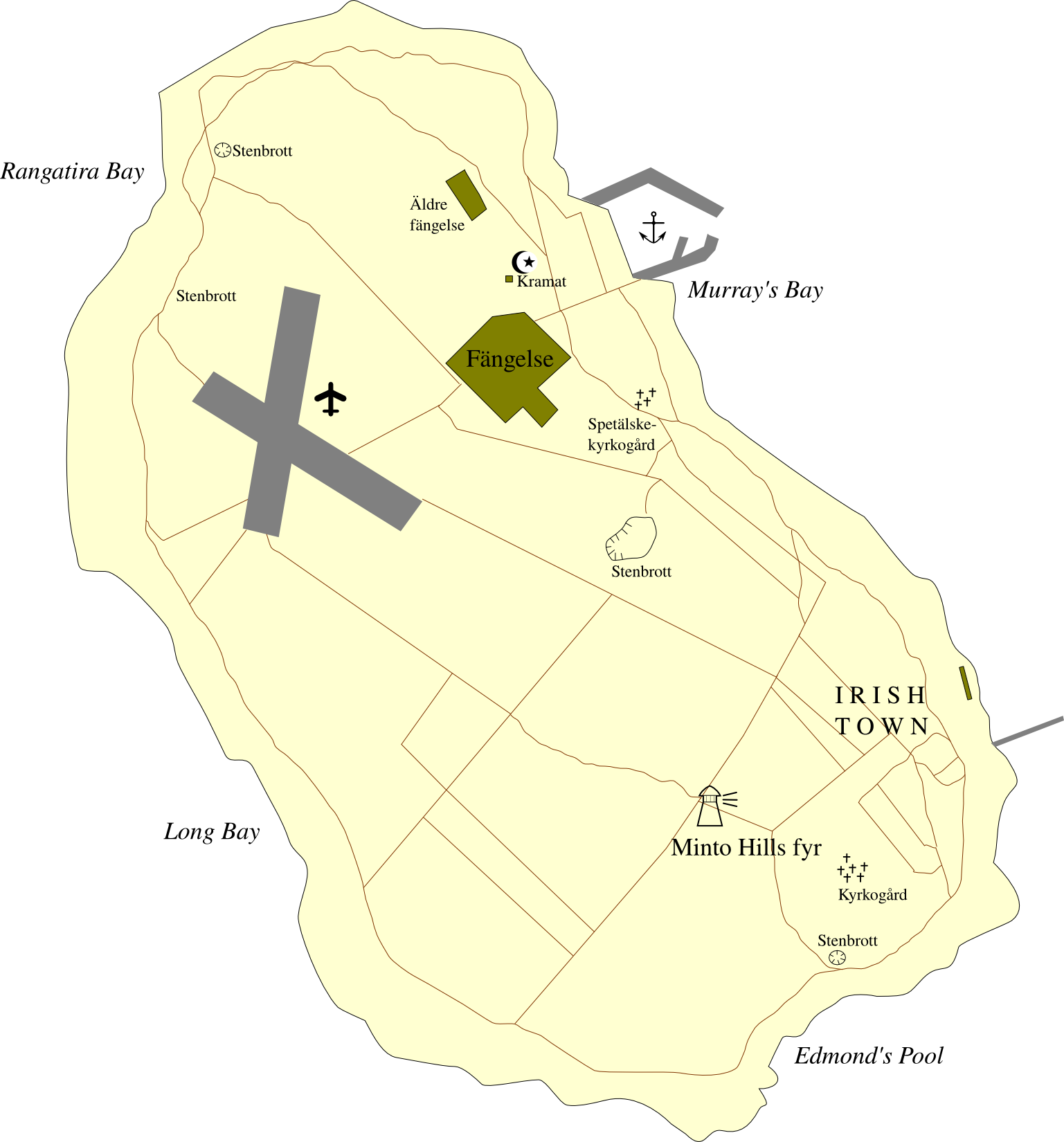 Svenskspråkig karta över Robben Island. Swedish map of Robben Island. Own work, coordinates from own photos and tourist maps.